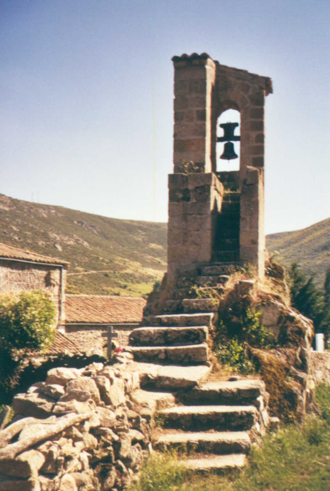 IGLESIA DE NAVALSAUZ (ÁVILA; ESPAÑA)